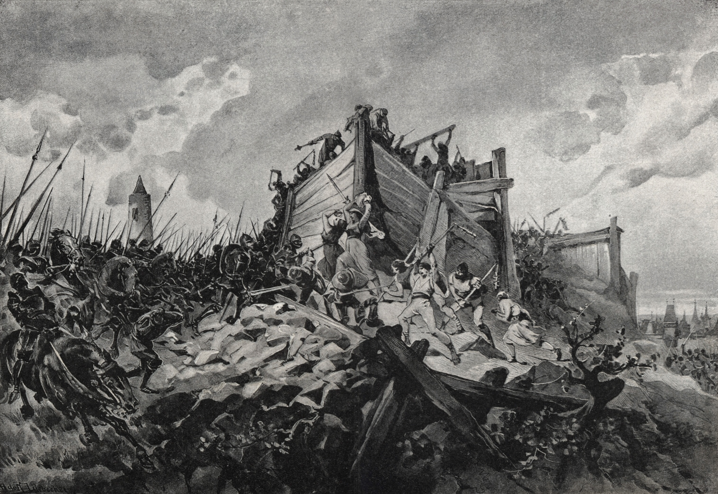 Adolf Liebscher - Bitva na hoře Vítkově dne 14. července roku 1420